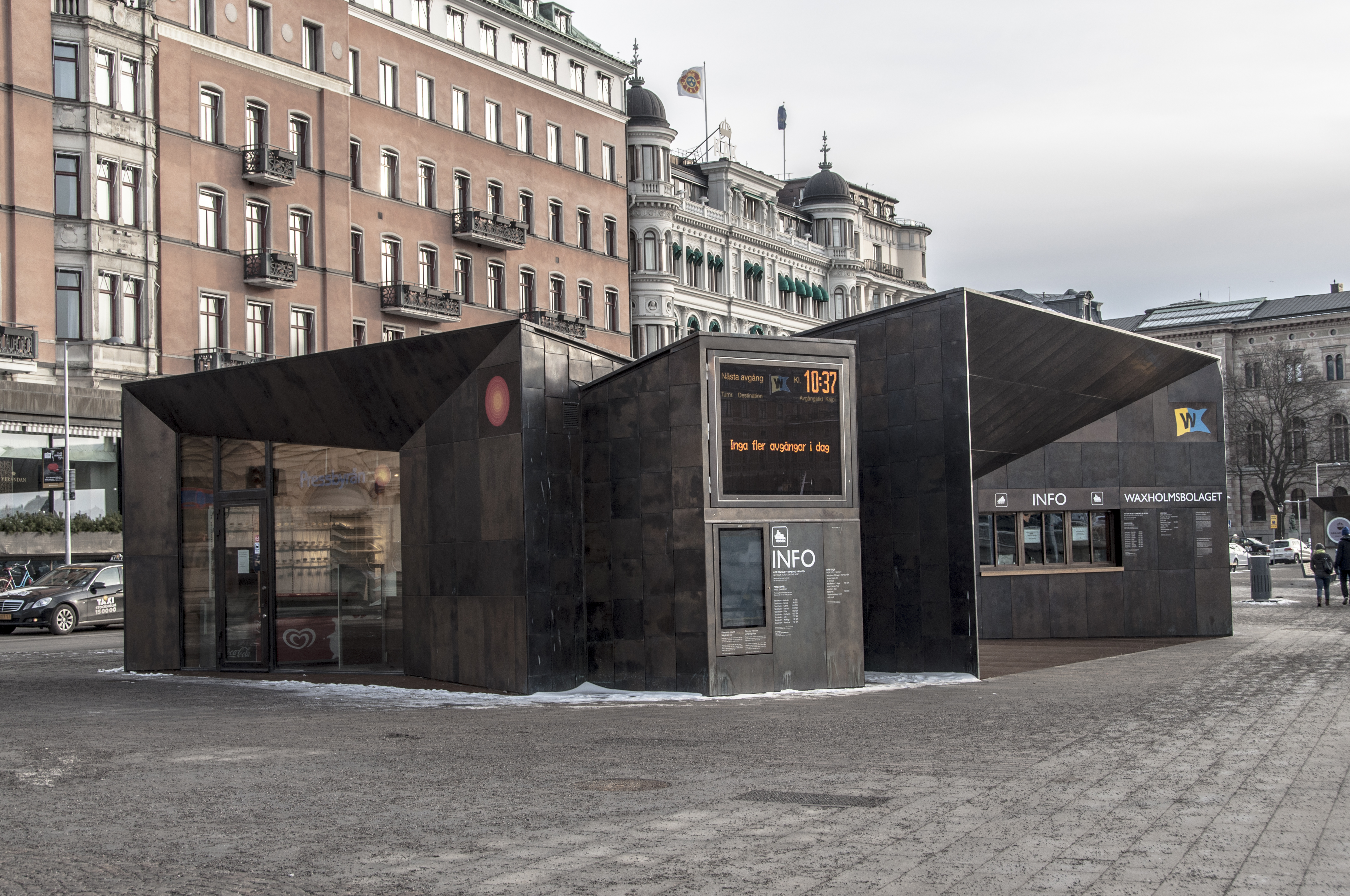 Waxholmsbolagets biljettkiosk, Byggnadsår 2013. Arkitekt: Marge Arkitekter